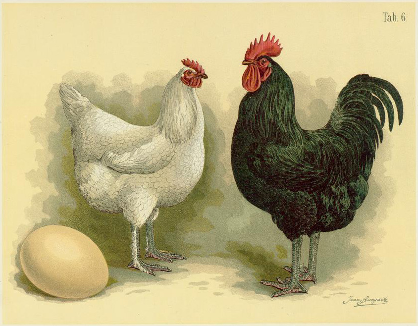 Langschan-Huhn. Gallus dom. gigant. mantchuricus. Langshan-fowl. Langshan.